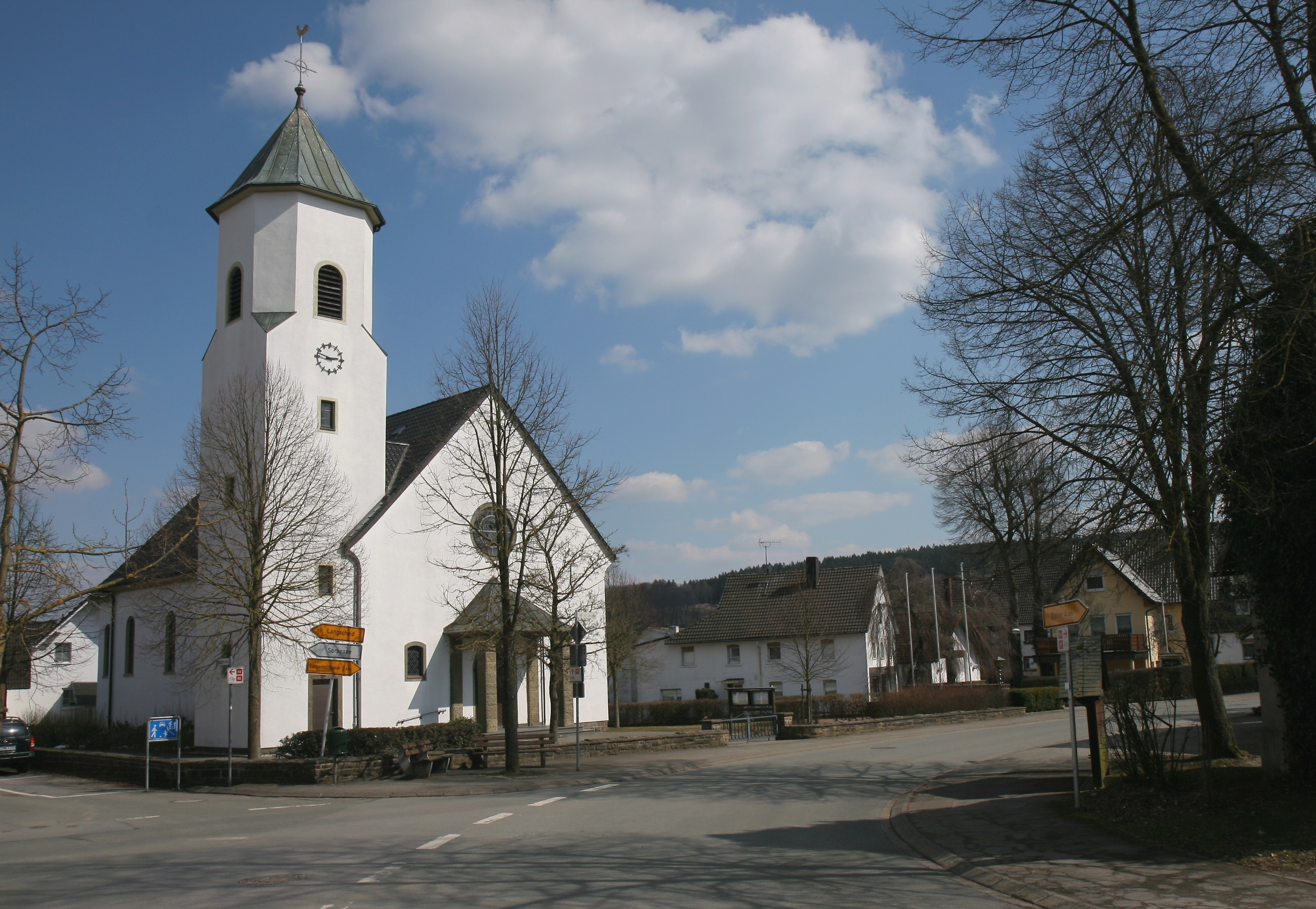 Katholische Kirche St. Barbara in Balve-Mellen. Kirchplatz 4.